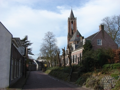 Nedersaksies: Amerongen kerk